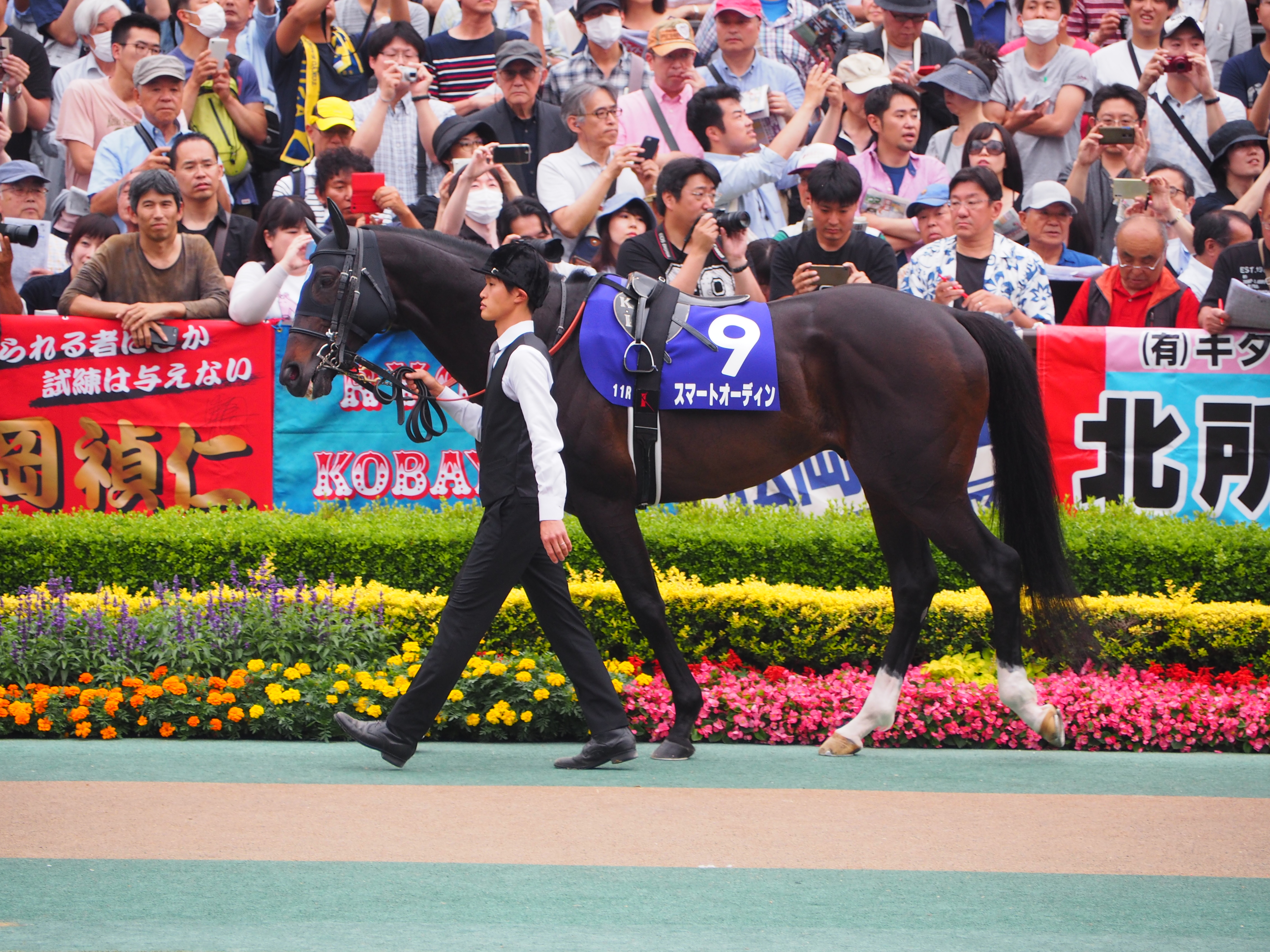 スマートオーディン 安田記念 2019年 パドック